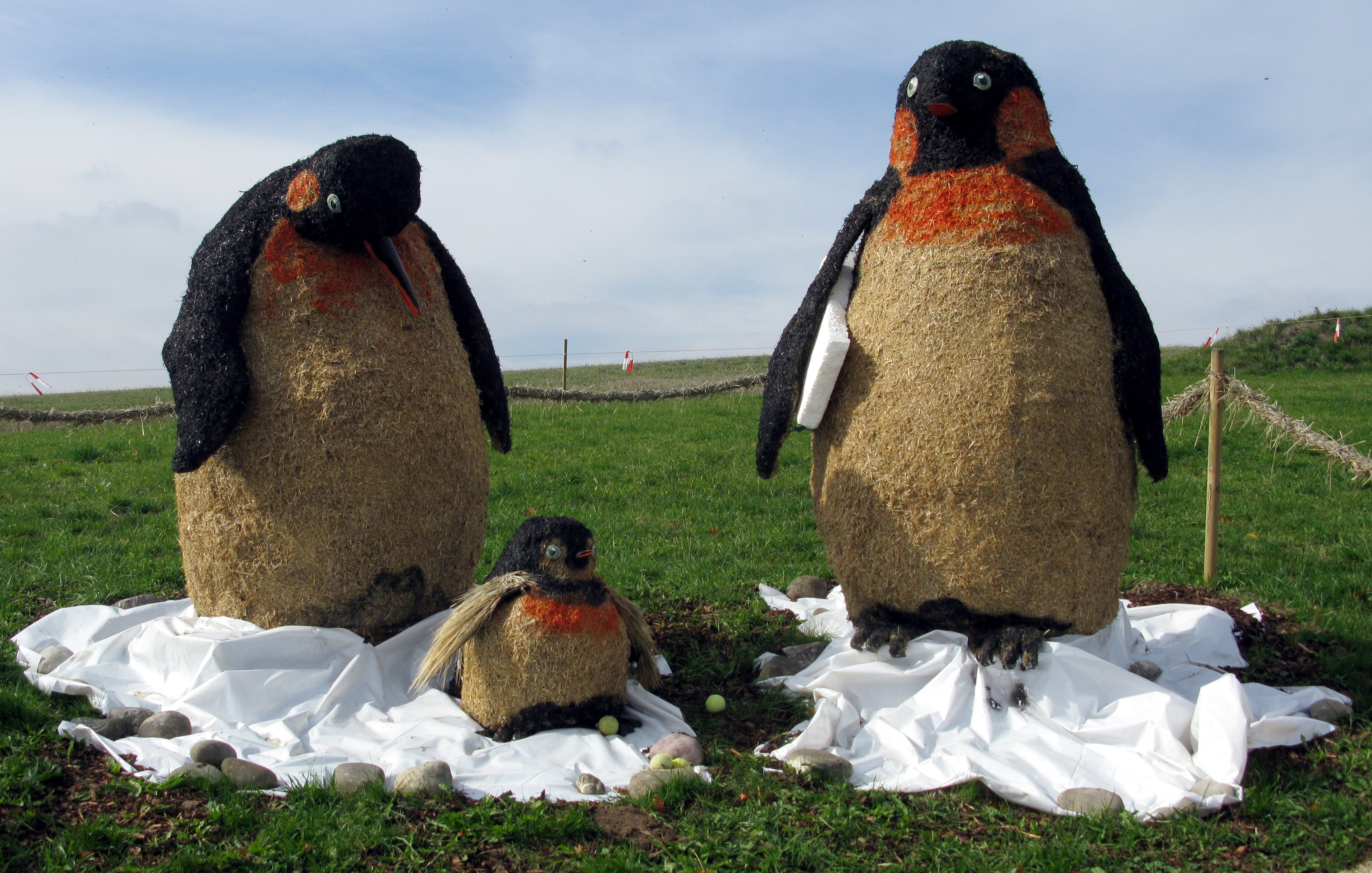 Strohskulpturen in Höchenschwand